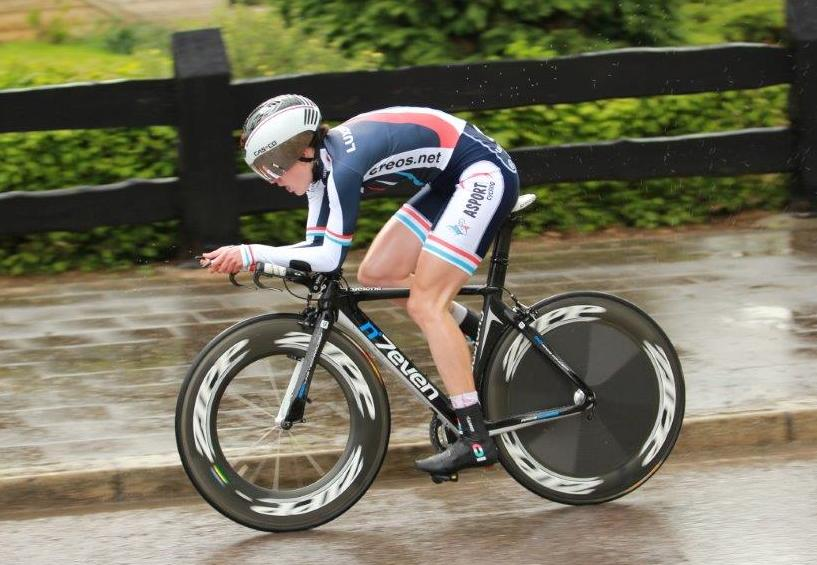 Christine Majerus, Goldmedail am Zäitfueren